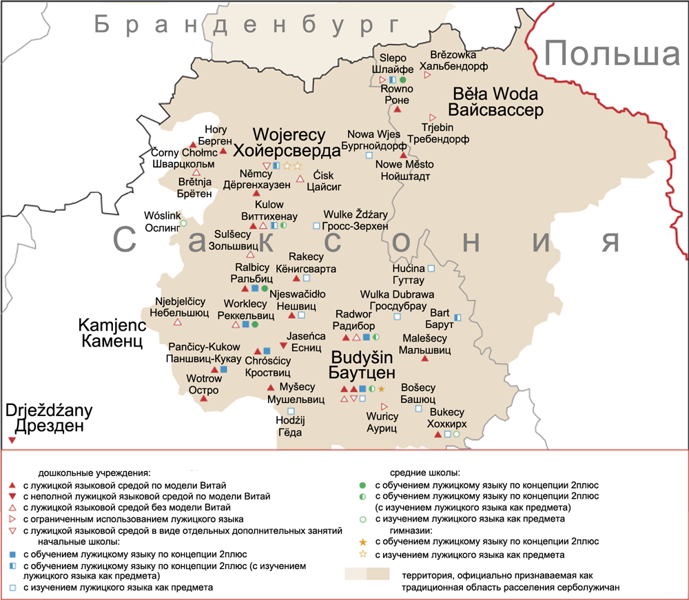 Обучение на серболужицком языке (дошкольное и школьное) или изучение серболужицкого языка как предмета в школах разного уровня в Саксонии (2012 год)